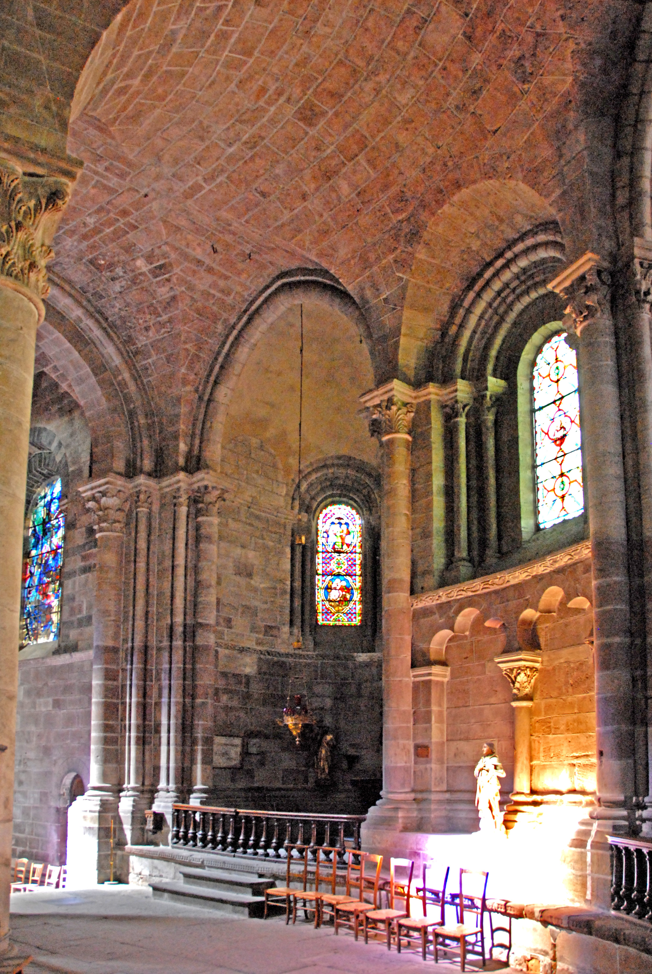 Saint-Julien Brioude, Umgang mit NW-Kapelle